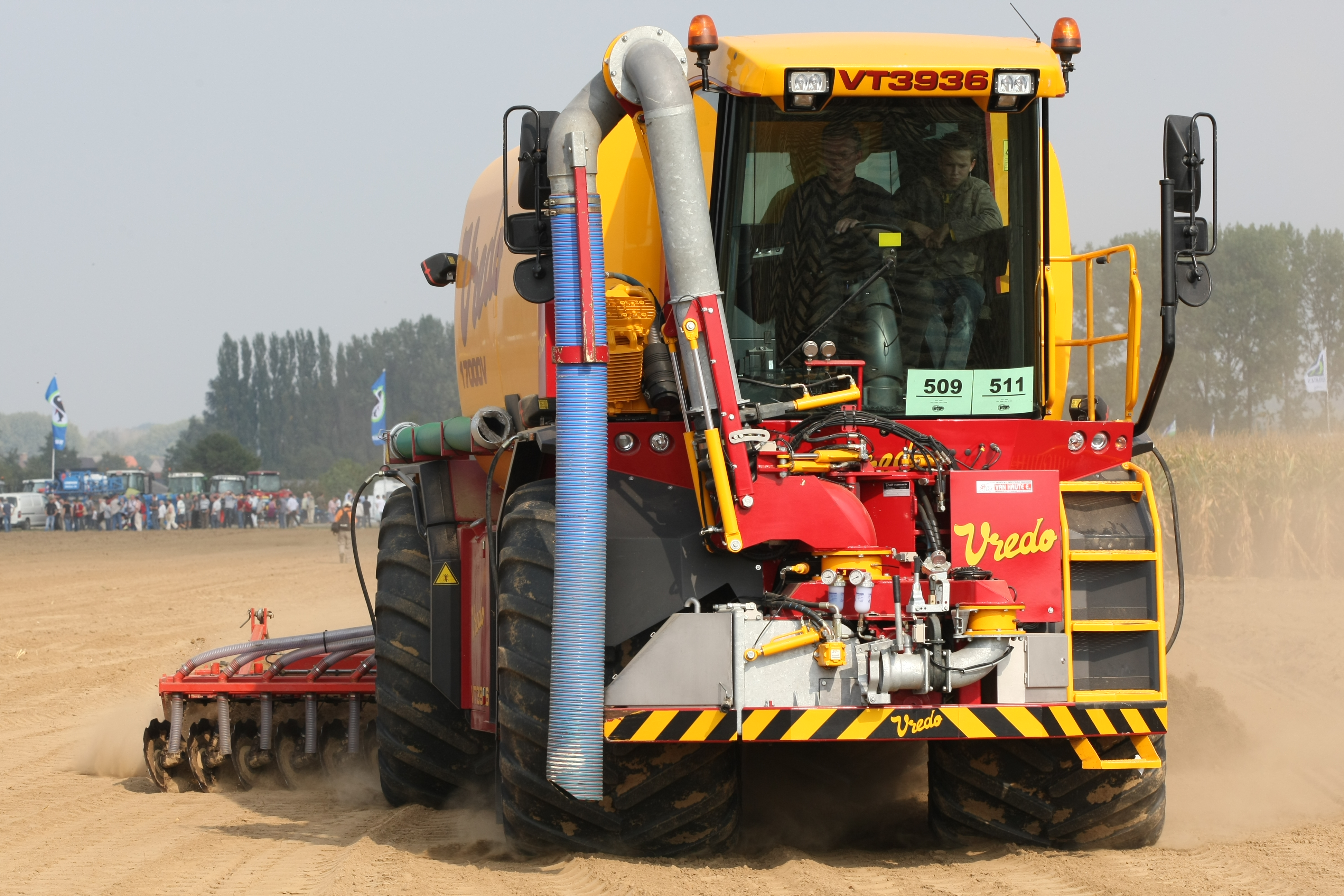 Vredo-Selbstfahrer VT3936 mit Gülletankaufbau, Werktuigendagen 2009